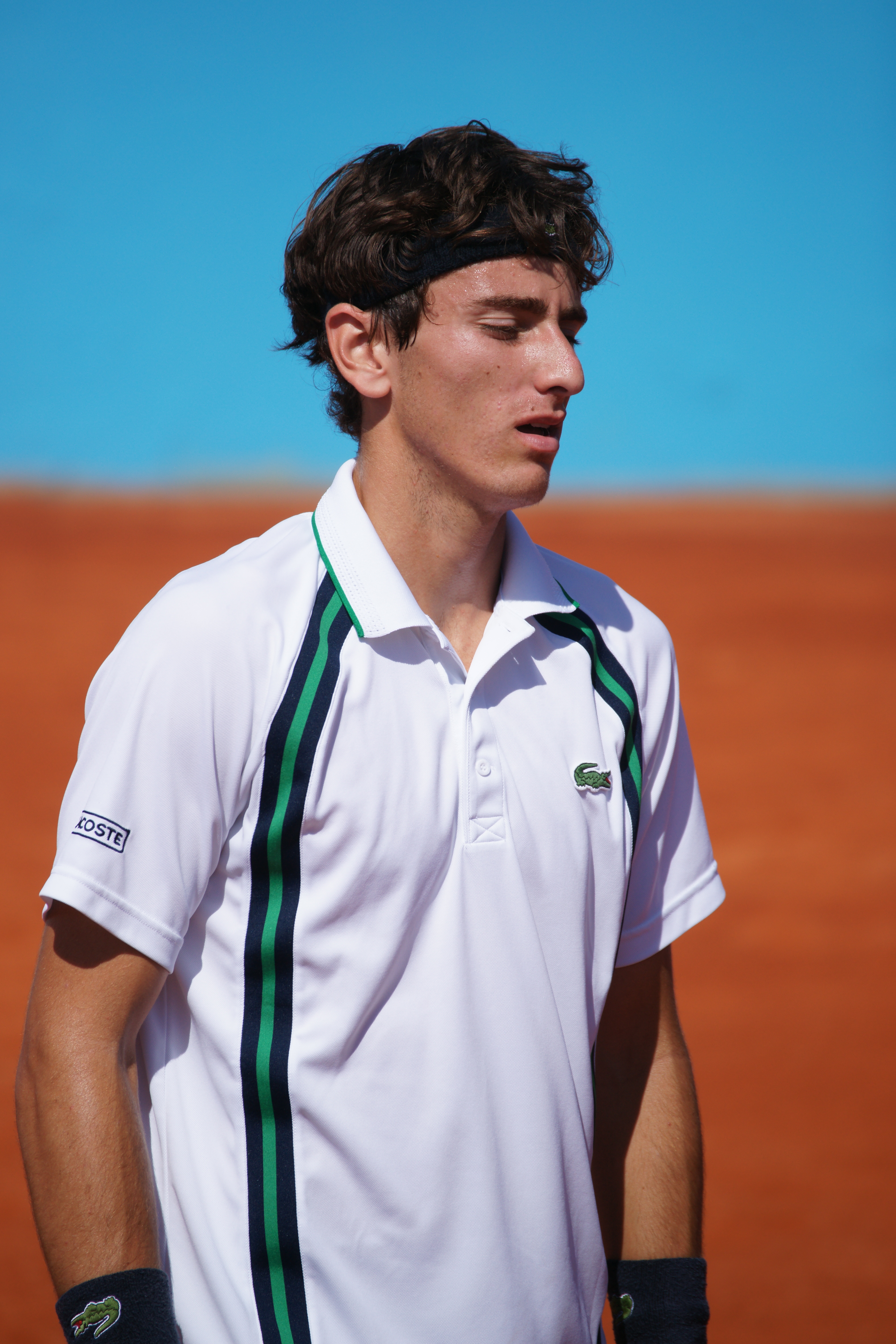 Elliot Benchetrit Nice ATP 2016